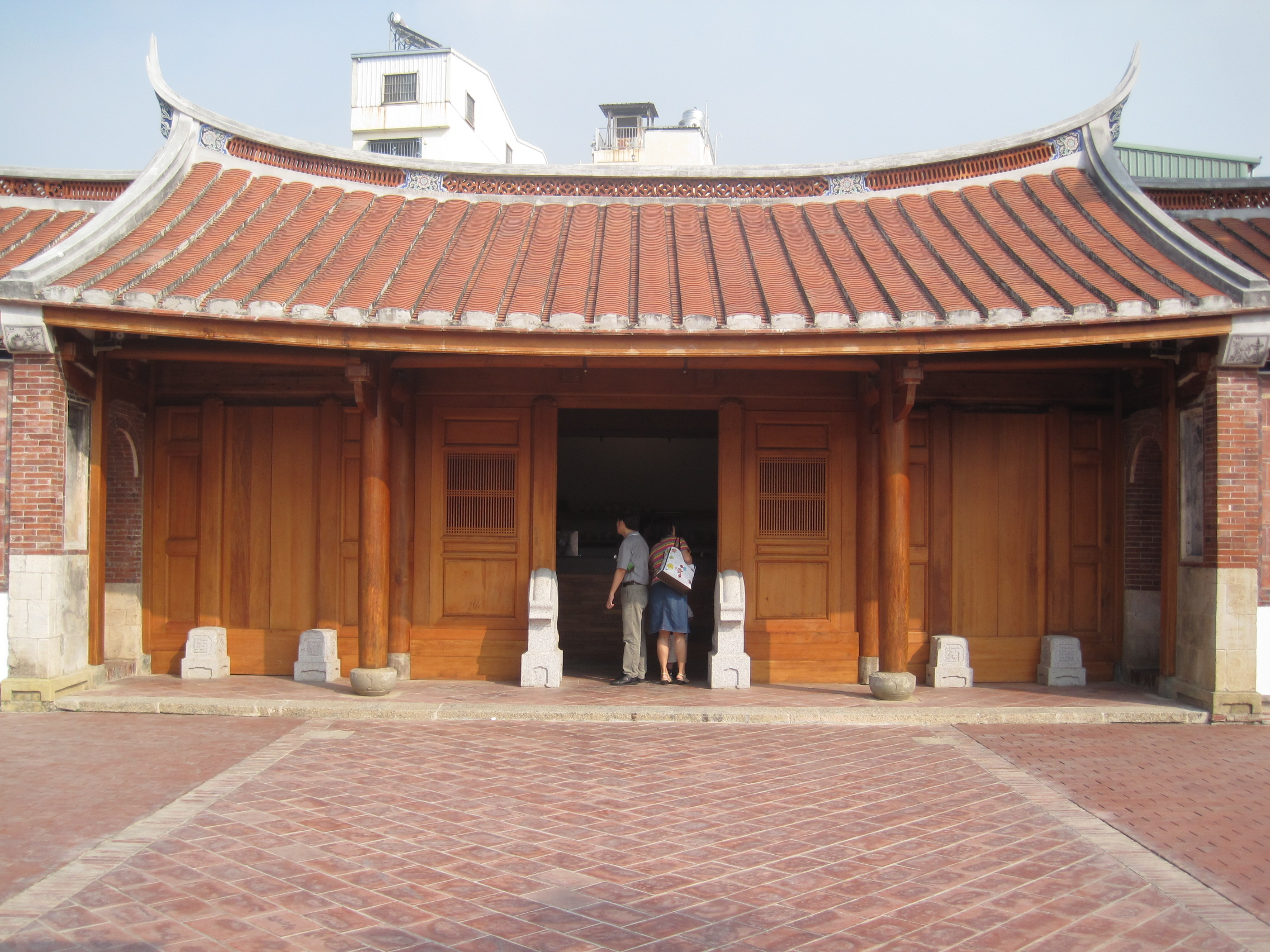 鳳儀書院原曹公祠